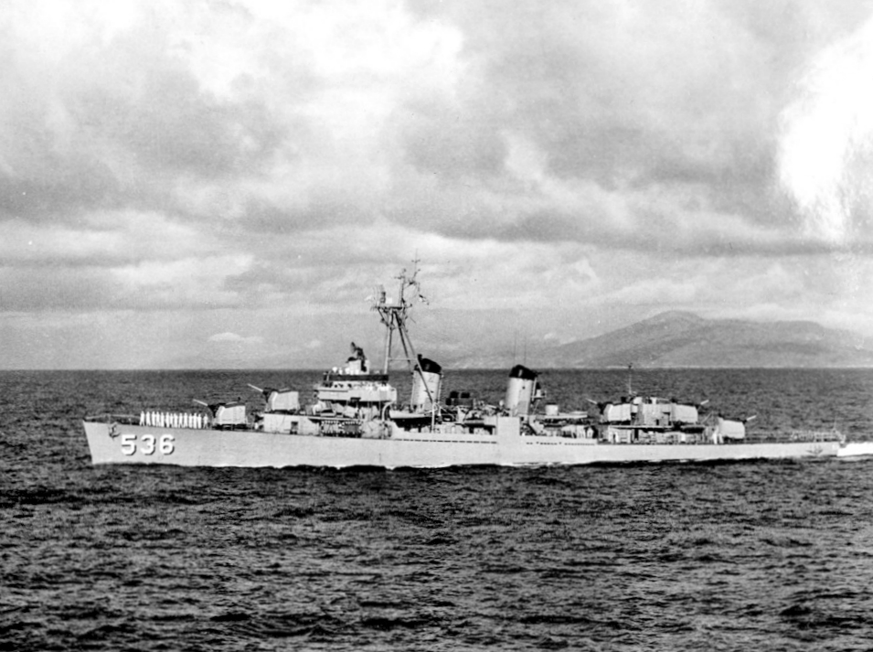 The U.S. Navy destroyer USS Owen (DD-536) underway in 1957.